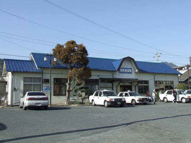 JR周防高森駅舎